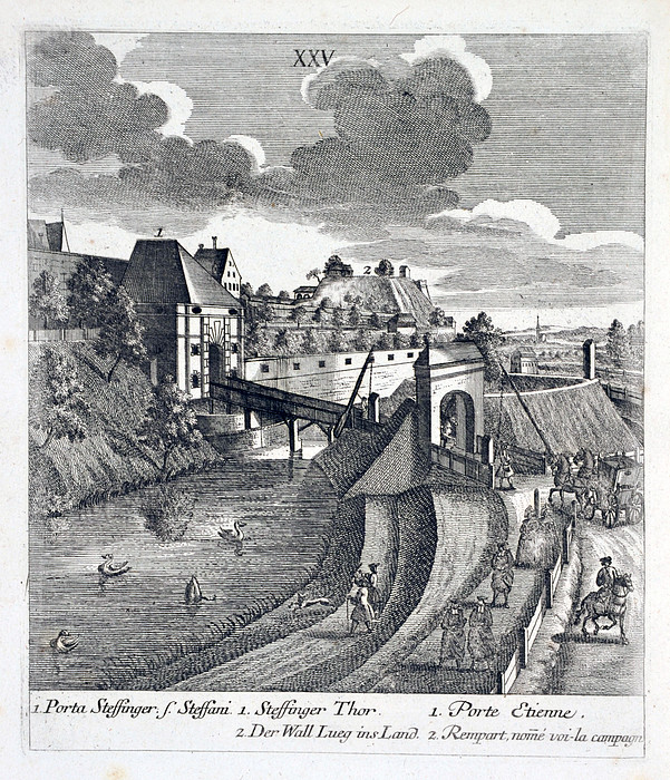 Steffinger Thor (Stephingertor), aus: G. H. Kayser: Die Schönheiten der Königl. Kreisstadt Augsburg und deren Umgebungen. Jenisch und Stage, Augsburg und Leipzig ohne Jahr (ca. 1818).